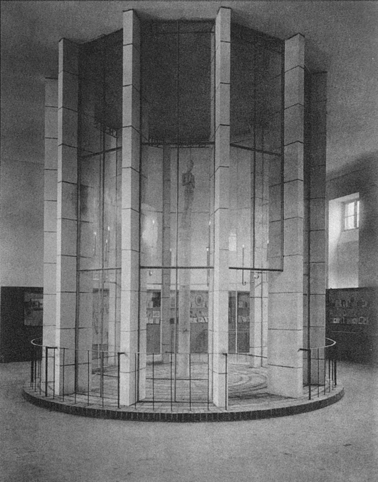 Kath. Abteilung der Pressa-Ausstellung 1928/Immaculata-Kapelle von Dominikus Böhm